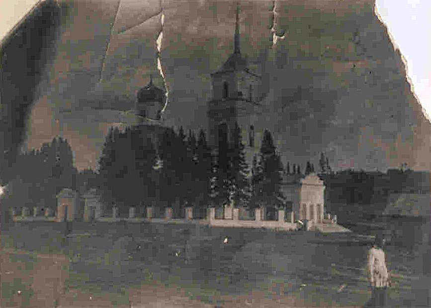 Храм Преображения Господня. Вид с северо-запада. Начало 1900-х годов